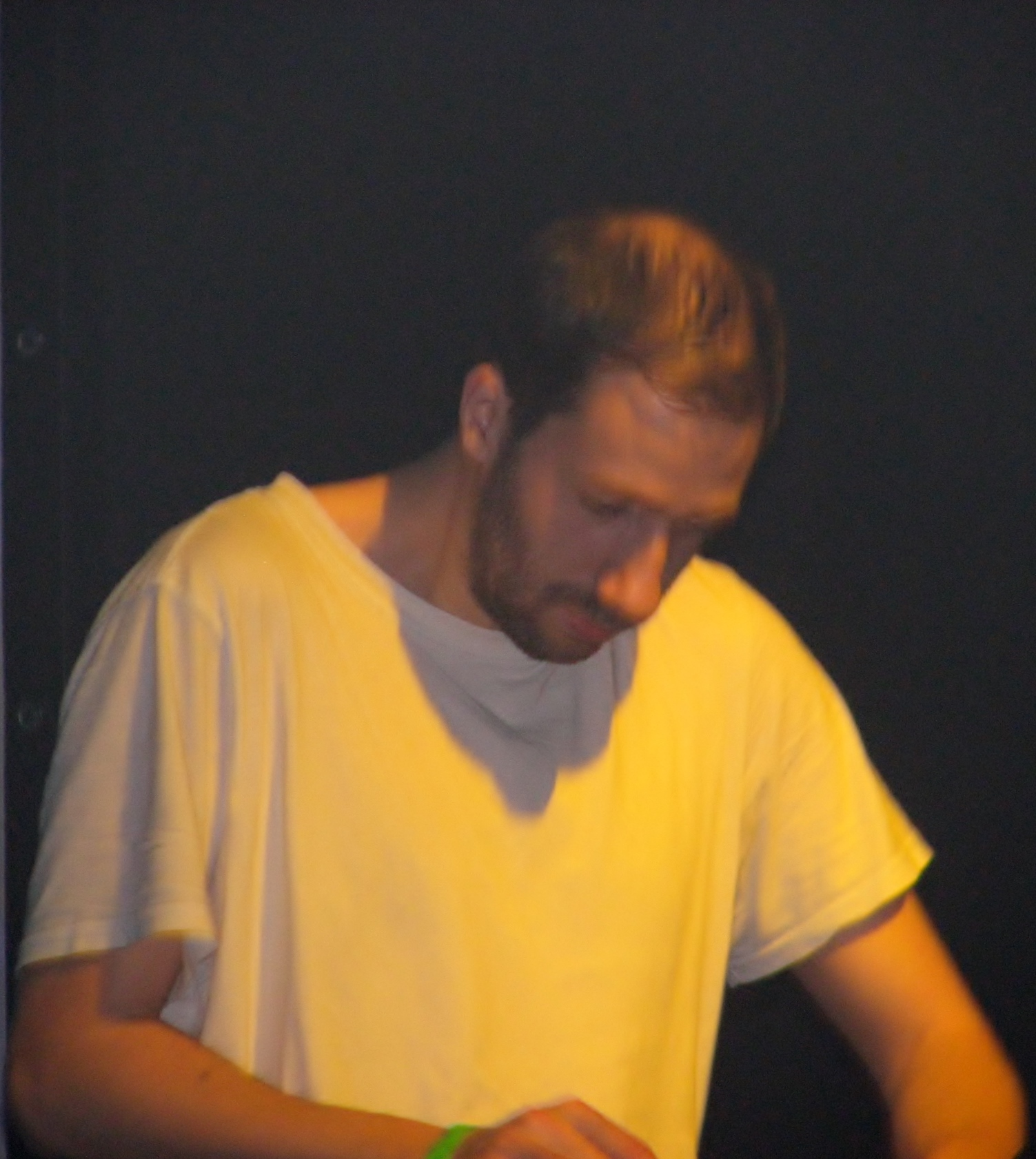 Gold Panda esinemas Rock Cafés